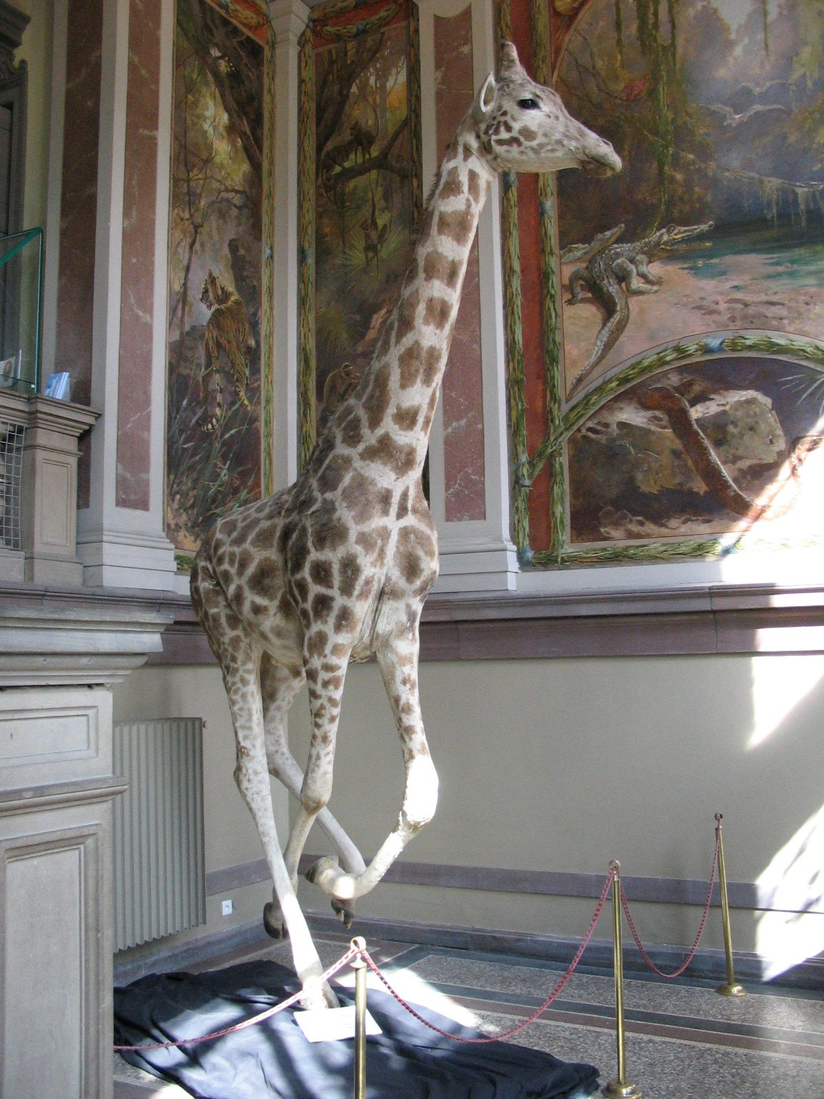 Girafe empaillée à l'entrée droite du musée zoologique de Strasbourg.